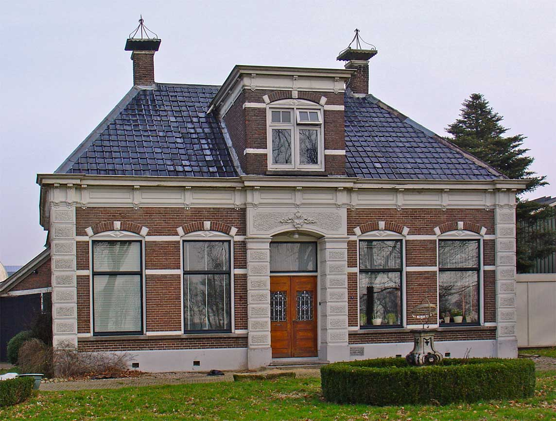 monumentale boerderij aan de Commissieweg in de Wijk